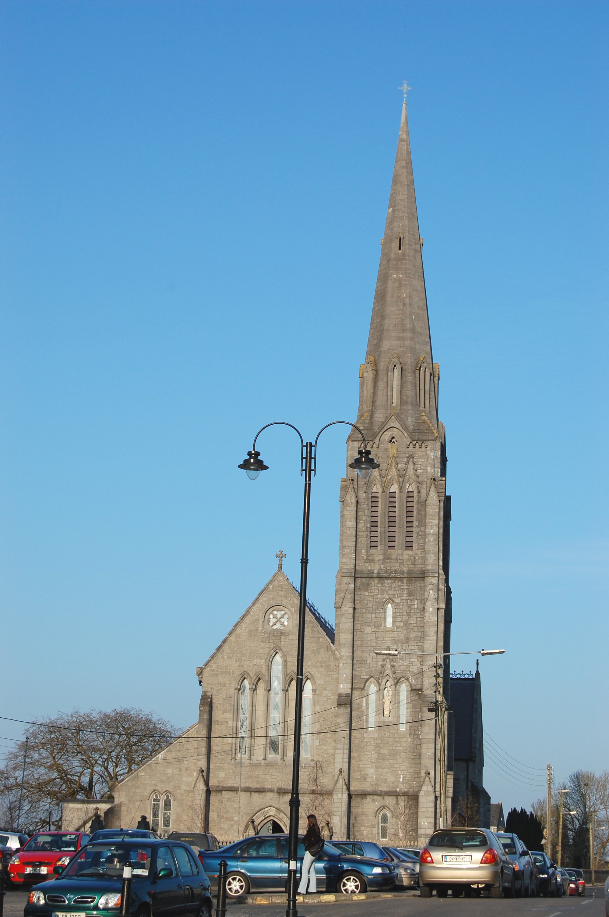 A igreja de Santa Maria (St. Mary's church) em Athlone, Irlanda.